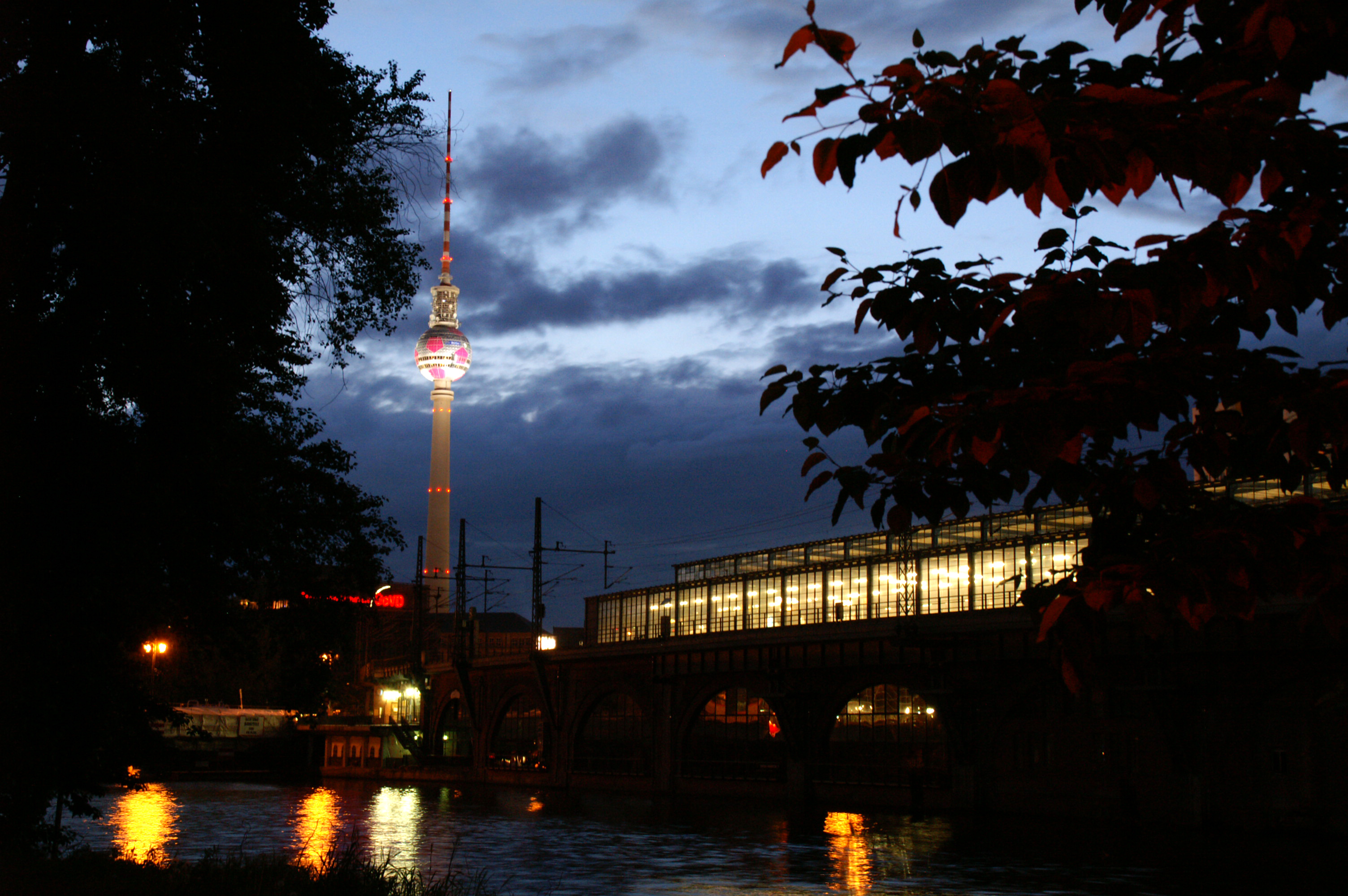 Wikipedia-Stammtisch Berlin